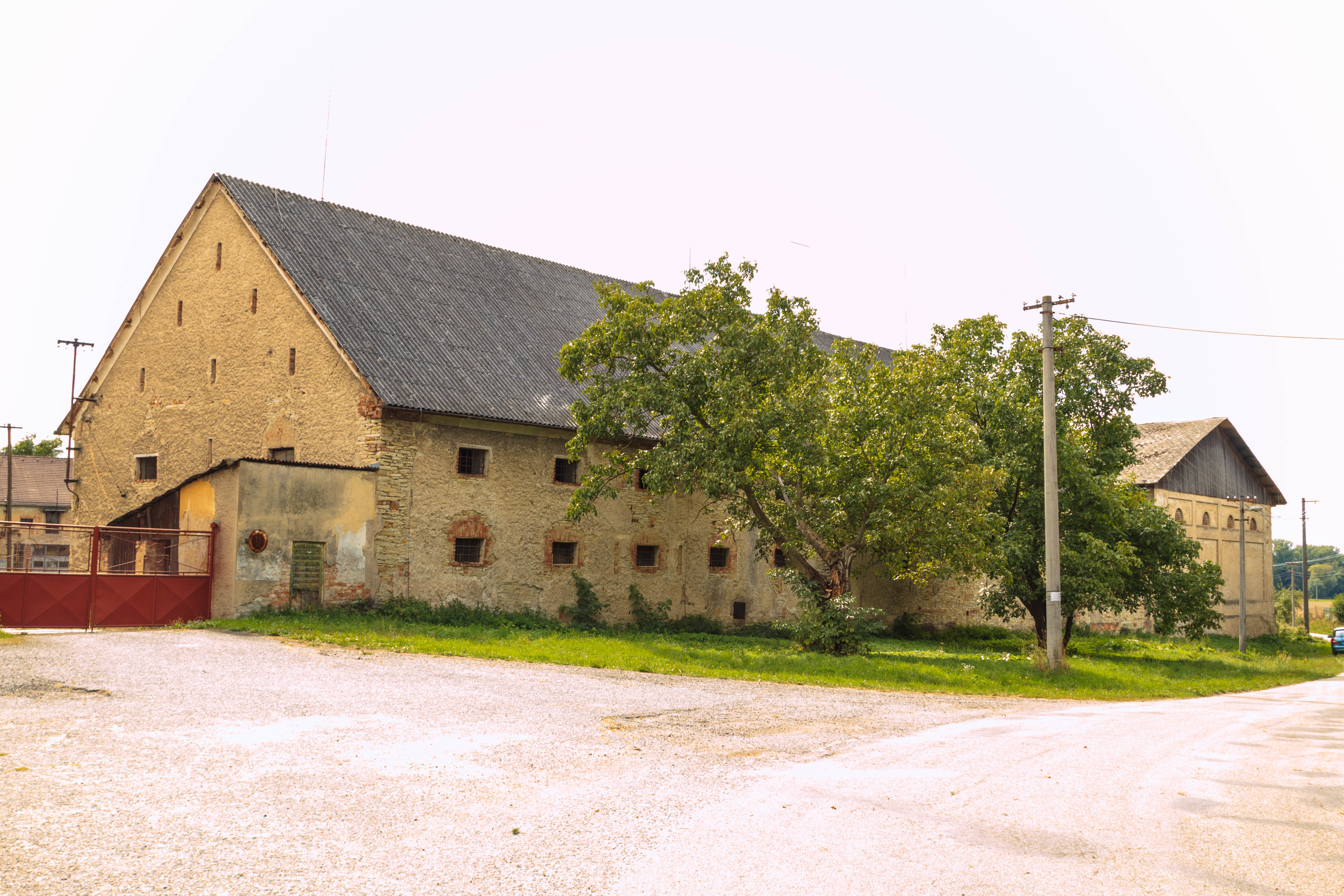 Březovice u Chroustovic stáje u zámku